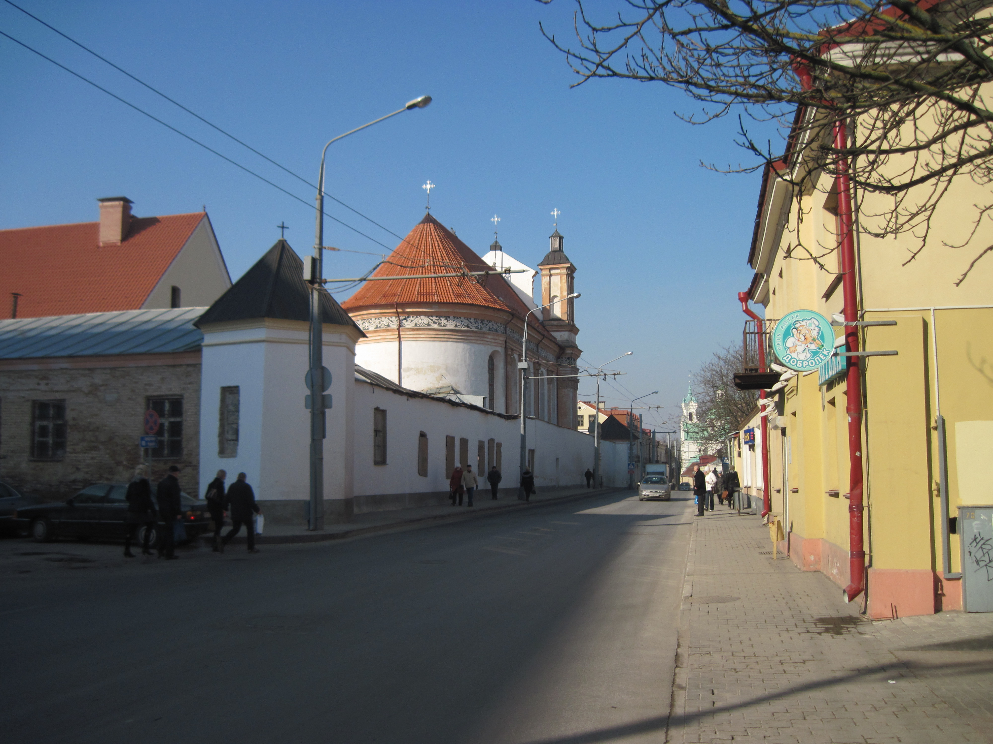 Від на касцёл брыгітак у Гродне, Беларусь.